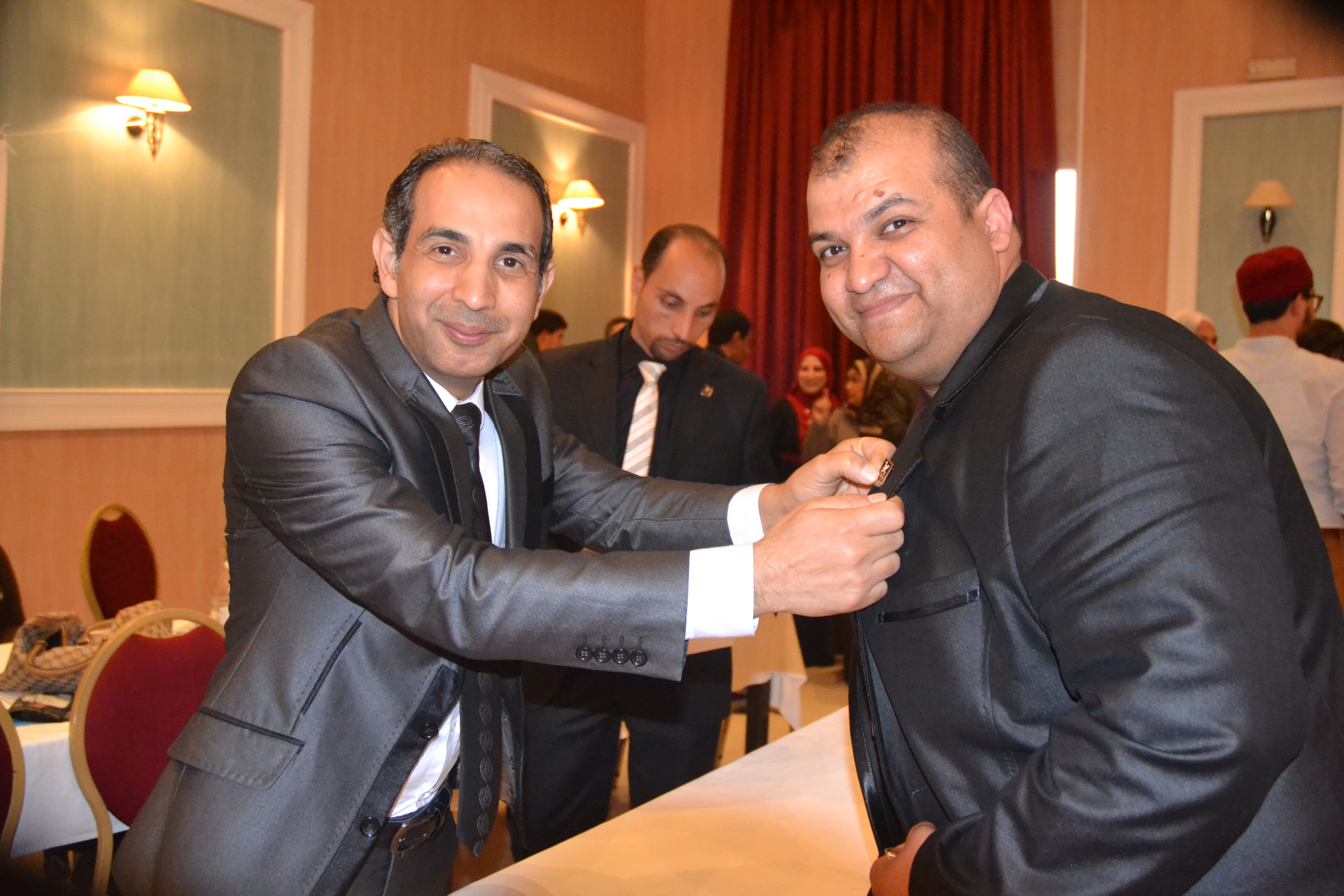 حفل تسليم الدبوس الخاص بالاستاذ أحمد قدوس